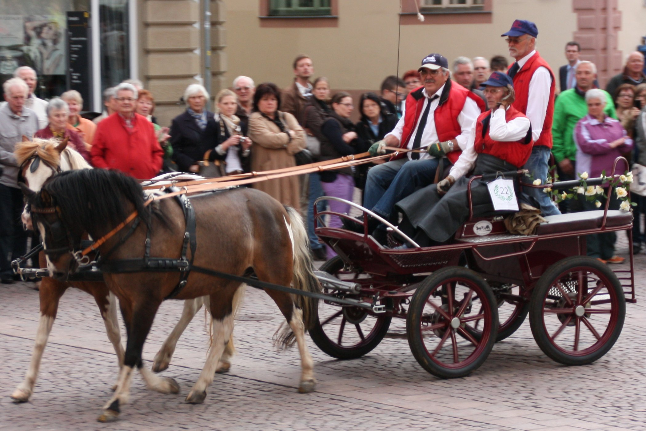 Kutsche Nr. 22 des Korso zur Eröffnung des Internationalen Pfingstturnier Wiesbaden 2013 in Hessen, Deutschland. Ein Marathonwagen gezogen von zwei Lewitzer Stuten im Brustblattgeschirr